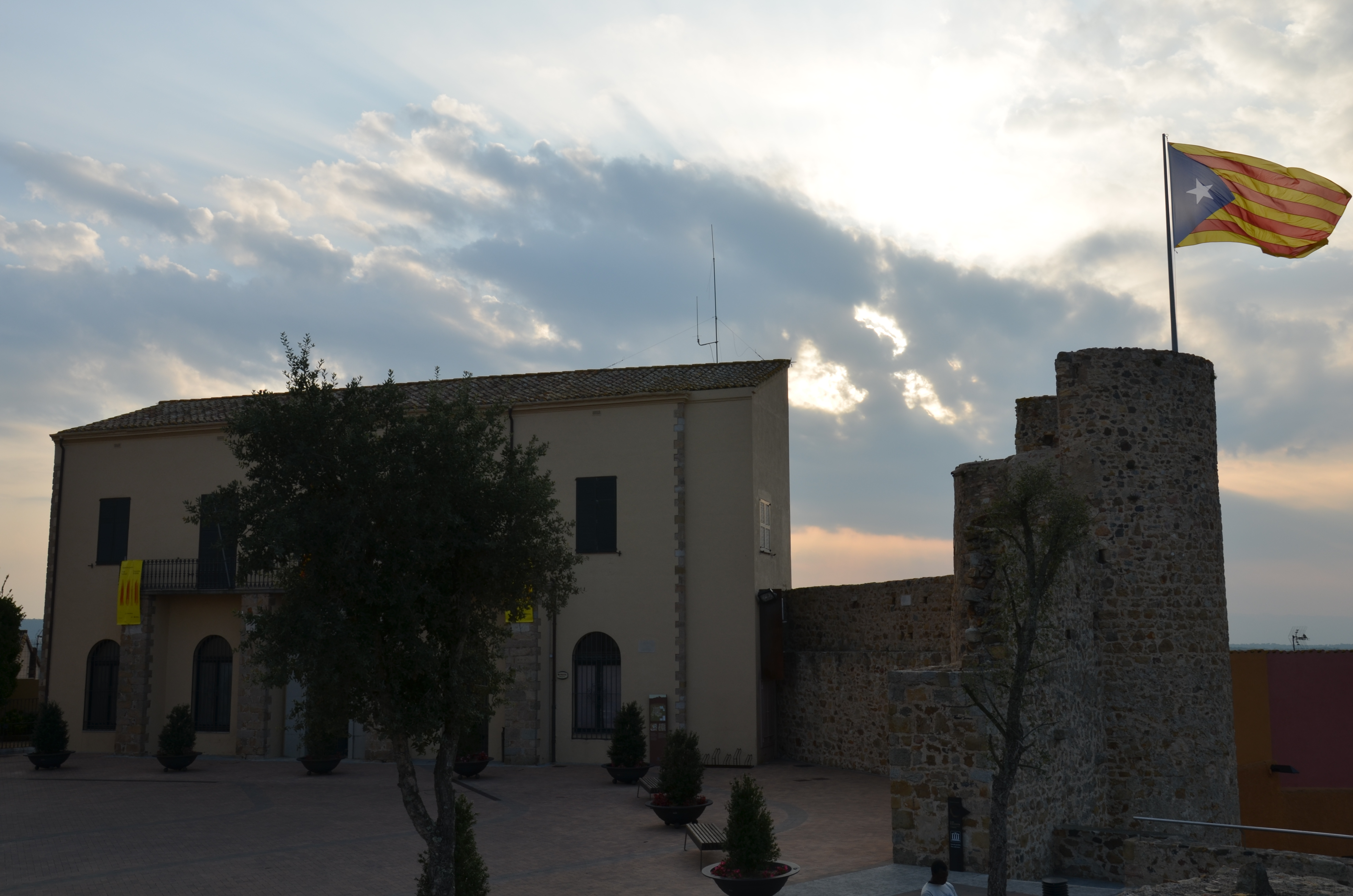 Vistes del Castell (Ajuntament) i de la torre (presó). Llagostera